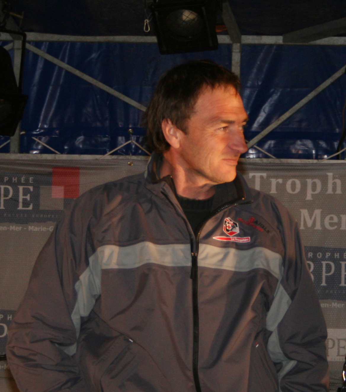 Description =Bertrand de Broc. Soirée présentation des shippers a Belle-Ile lors du Trophée BPE Source =Photo taken by Remi Jouan Date =Mars 2007 Author =Remi Jouan